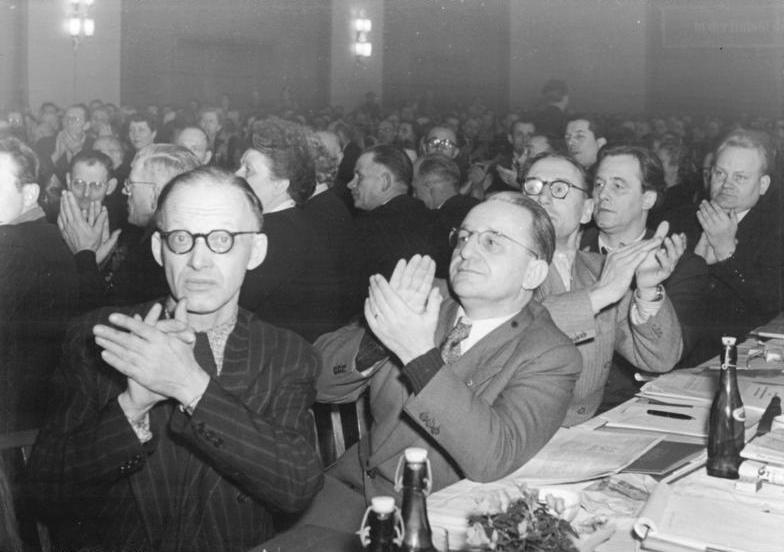 Zentralbild Junge Sturm 12.3.1954 Bezirksdelegiertenkonferenz der Sozialistischen Einheitspartei Deutschlands von Groß-Berlin im VEB Begmann-Borsig Unter dem Motto "Macht Berlin zum Kraftzentrum des Nationalen Kampfes unseres Volkes" wird vom 12. bis zum 14.3.1954 im VEB Bergmann-Borsig, Berlin-Wilhelmsruh, die Delegiertenkonferenz der Sozialistischen Einheitspartei Deutschlands in der Vorbereitung des IV. Parteitages von Groß-Berlin durchgeführt. UBz: Blick in den Tagungsraum.